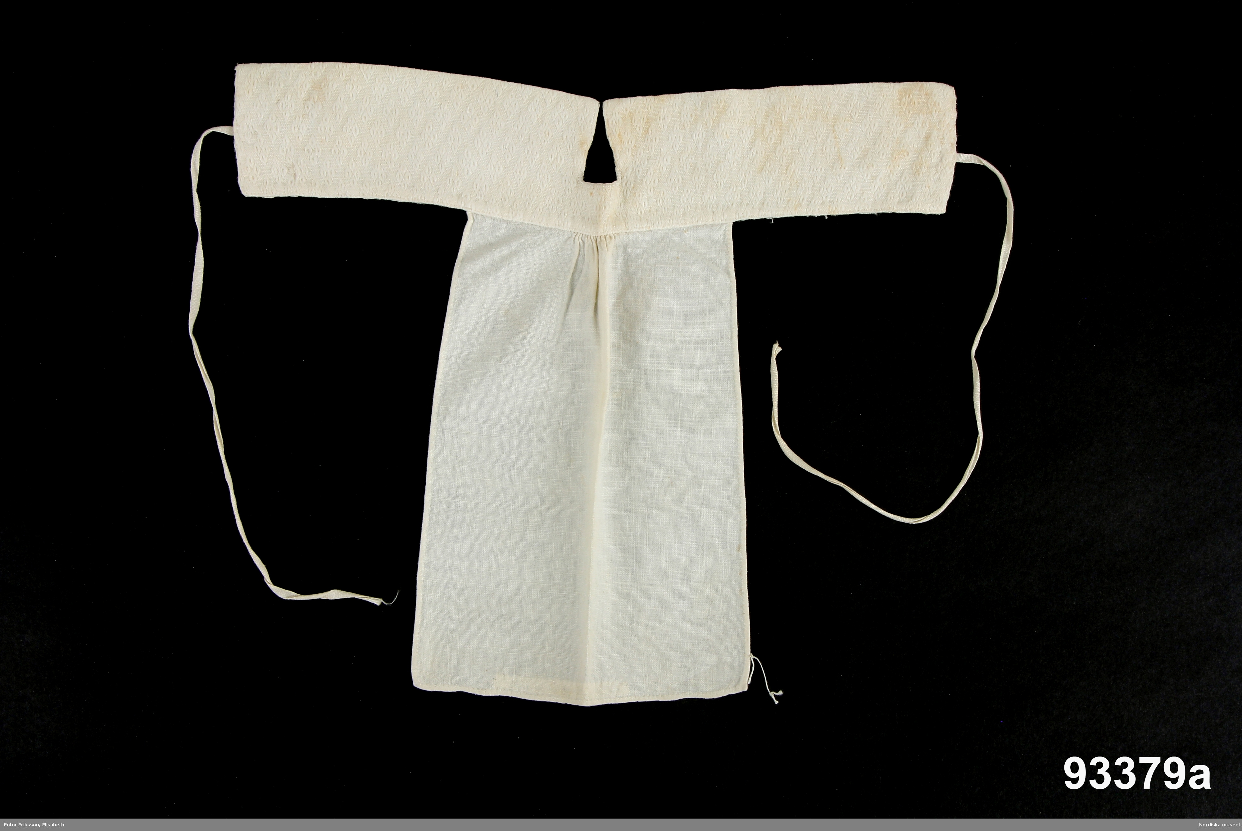 Huvudliggaren: "Nattkappor, 3 st., tillhörande mansdräkten." Bilaga: Ingen ytterligare information utöver huvudliggaren. Katalogkort: 93 379: "Nattkappa för herre. Hela l. 26 cm. Kragens l. 36 cm. Dubbel av vitt mönstervävt bomullstyg, med halssprund framtill, knytband 30 och 36 cm. långa och 0,5 cm breda av linne. Bröstlapp av vitt bomullstyg längd 24 cm. bredd 16 cm." a-c; Ingen ytterligare information. /Inga-Lill Eliasson 2006-11-27 3 stycken likadana nattkappor från Gagnef sn. Den uppstående kragen av dubbel vit bomullsväv av pikétyp med rombmönster, fyrkantigt urtag mitt fram, försedd med smala knytband bak av linne. Bröstlapp av tunnare vit bomullslärft fastsydd mot kragen med litet rynkparti mitt fram. Berit Eldvik 2004